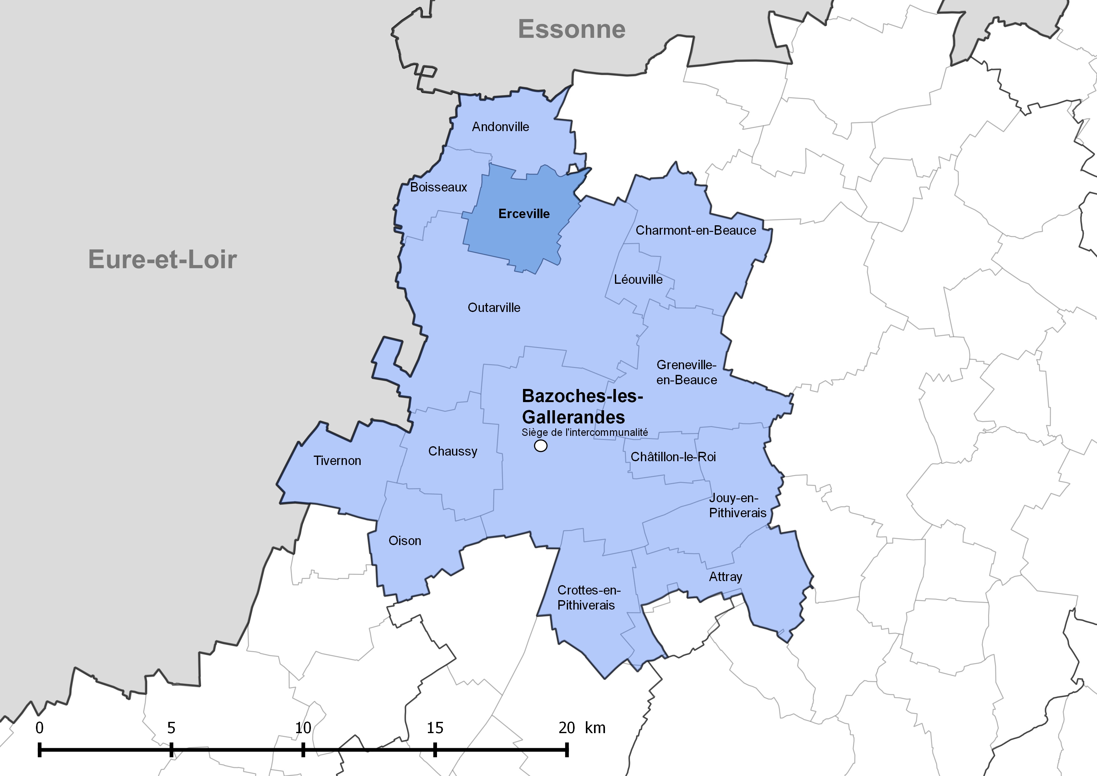 Périmètre de la communauté de communes de la Plaine du Nord Loiret - Situation de la commune de Erceville.